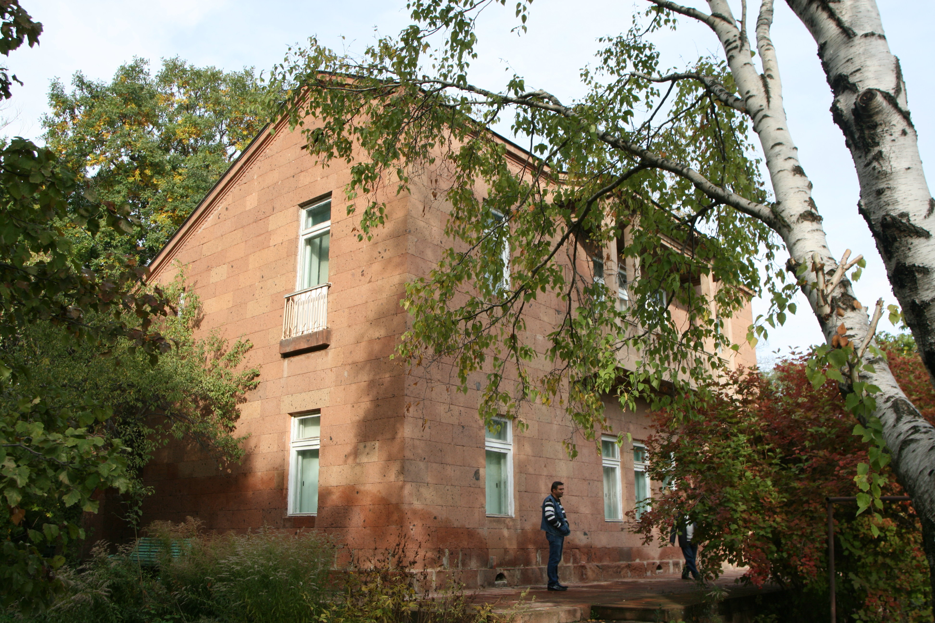 Byurakan, Armenia